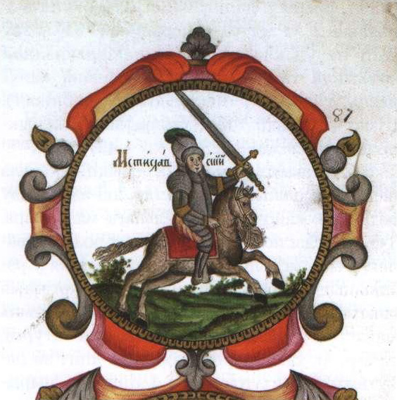 Беларуская (тарашкевіца): Герб Амсьціслаўскага княства (Amścisłaŭ) з Пагоняй (Pahonia). Маскоўскі Тытулярнік, 1672.